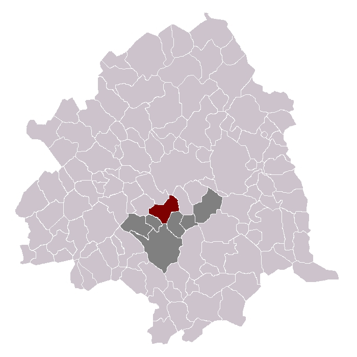 Wattignies dans son canton et son arrondissement